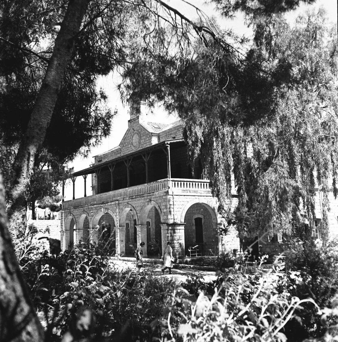 אוסף צילומים של הצלם זולטן קלוגר טווח מספרי התשלילים 27909 - 27947: בית הבראה של קופת חולים בצפת - "בית בוסל"